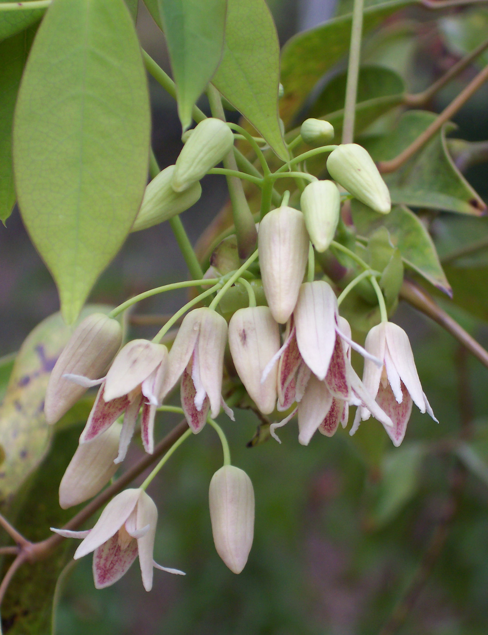 Stauntonia hexaphylla. Real Jardín Botánico, Madrid